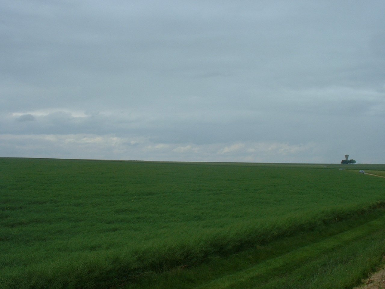 Vue de la Beauce